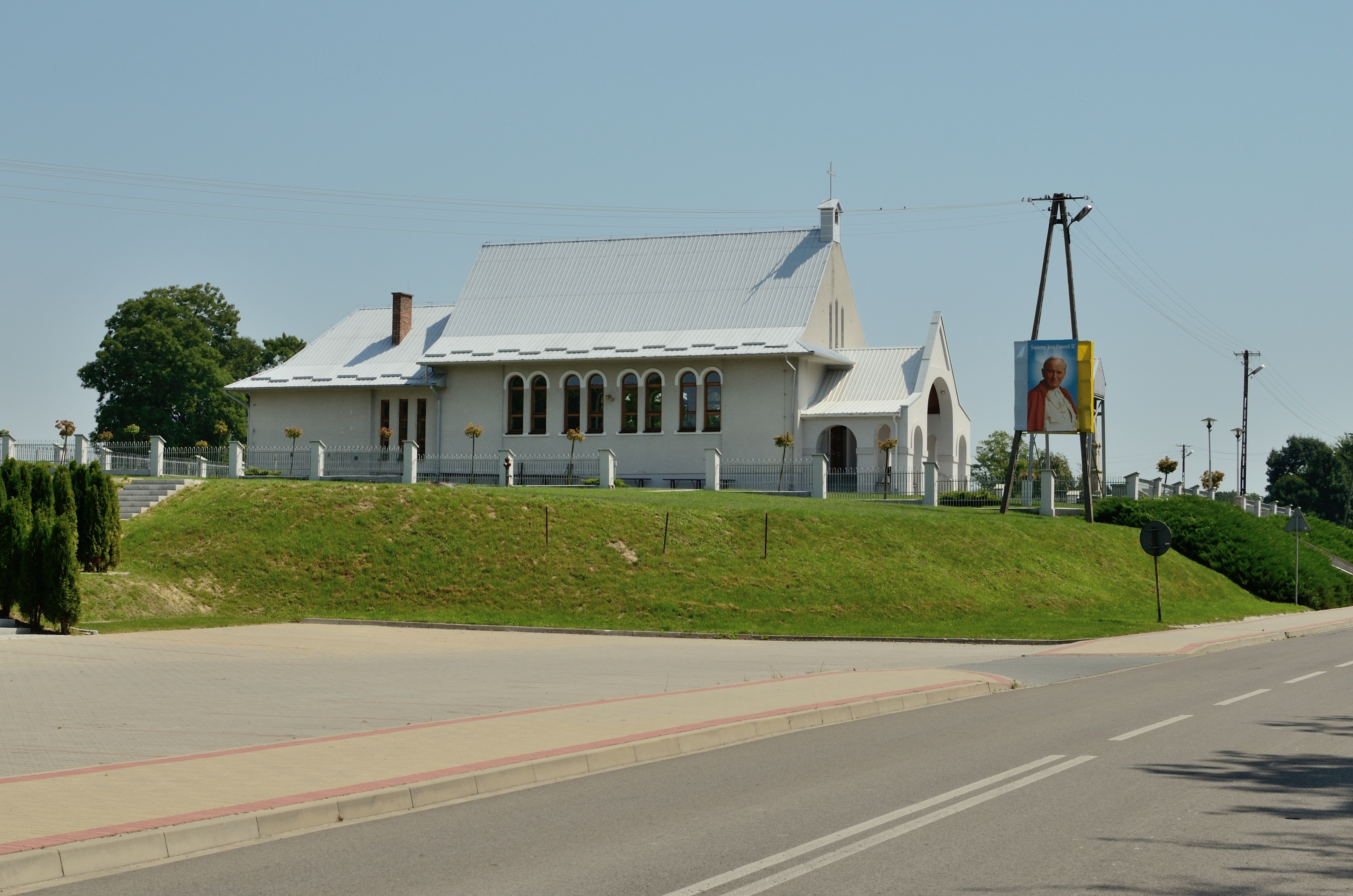 Kościół pod wezwaniem Narodzenia Najświętszej Maryi Panny w Chmielku (widok z boku)